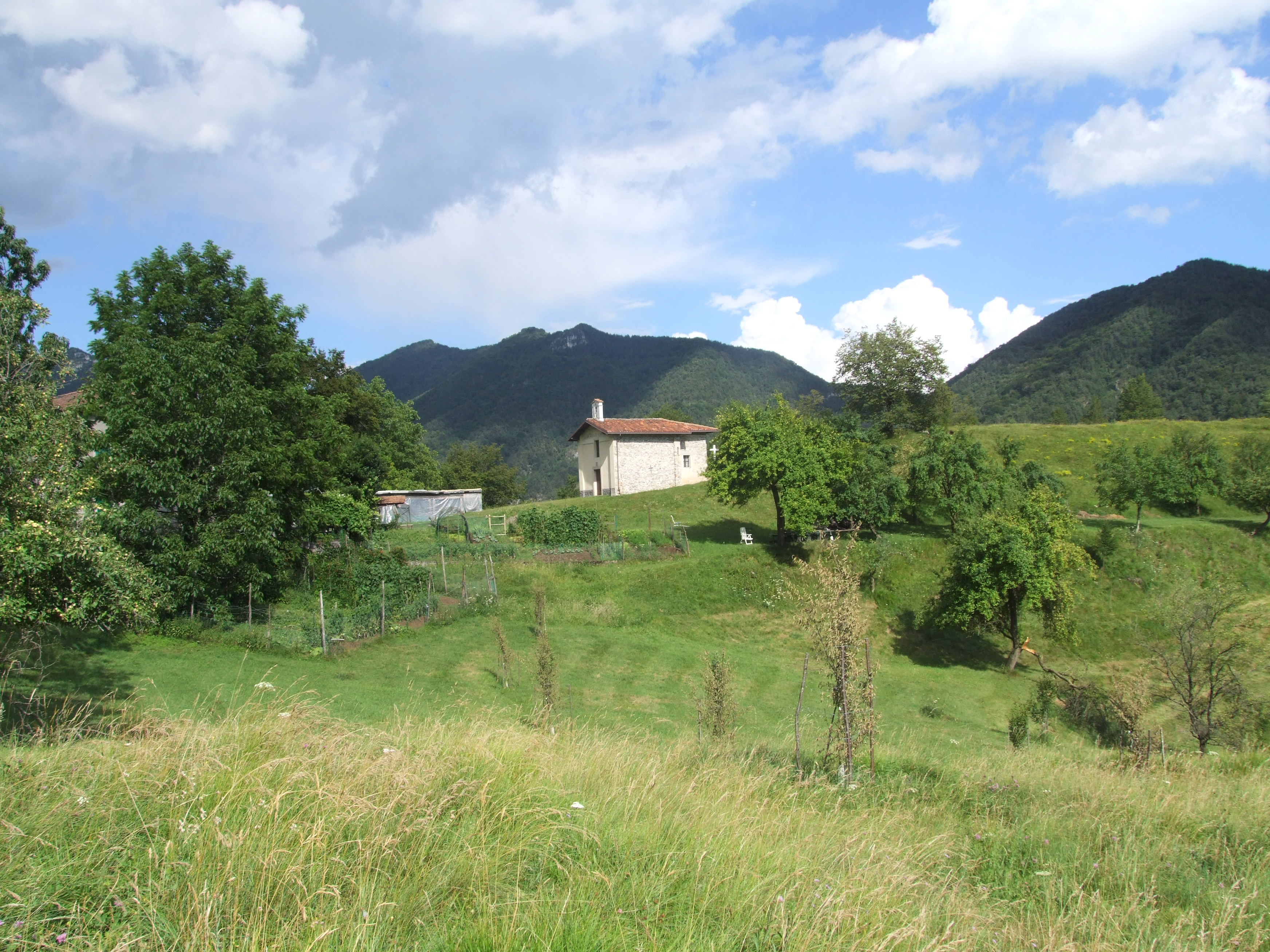 Droane di Valvestino